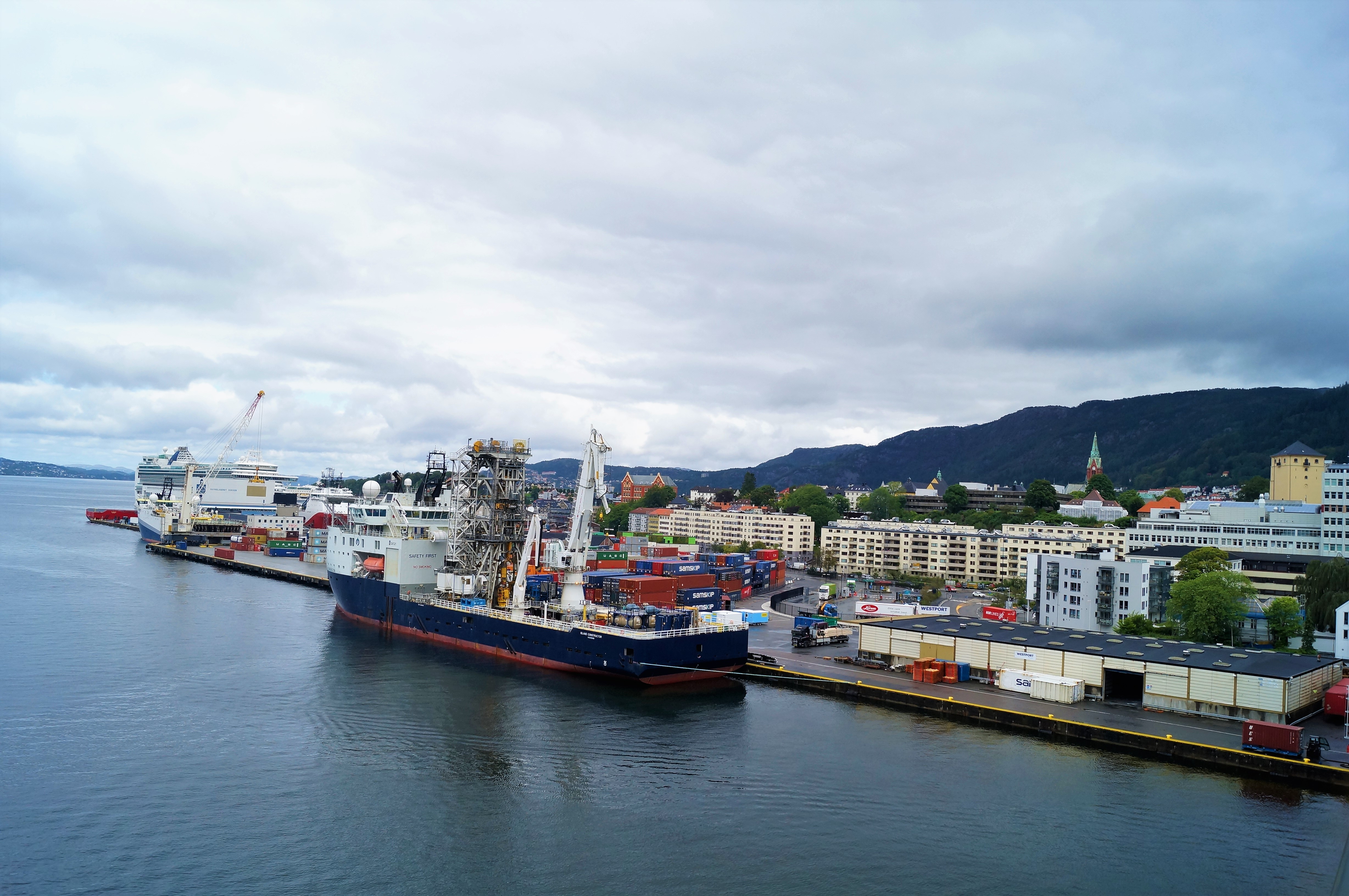 Dokkeskjærskaien i Bergen